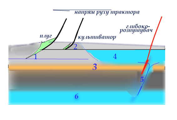 На схемі показано принцип роботи глибокорозпушувача для ілюстрування статті глибокорозпушувач